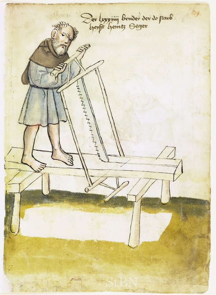 heintz (Heinz) Seger (Säger; Seger; Seeger;) , Seger (Säger) Transkription und weitere Informationen